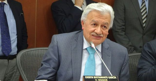 Senador Bustamante en comisión sexta